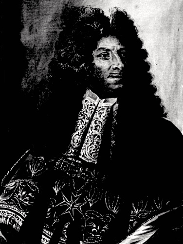 Portrait de Joseph de Montclar.